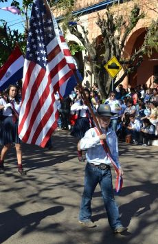 Niño estadounidense disfrazado de sheriff durante un desfile en Itauguá, Paraguay.